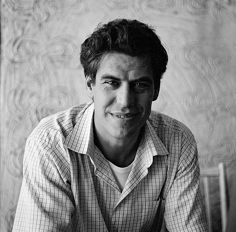 Дмитрий Дюжев 2011